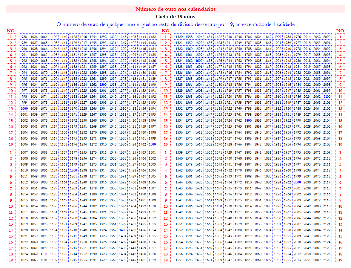 Tabela com os números de ouro dos anos no intervalo entre 988 e 2127.